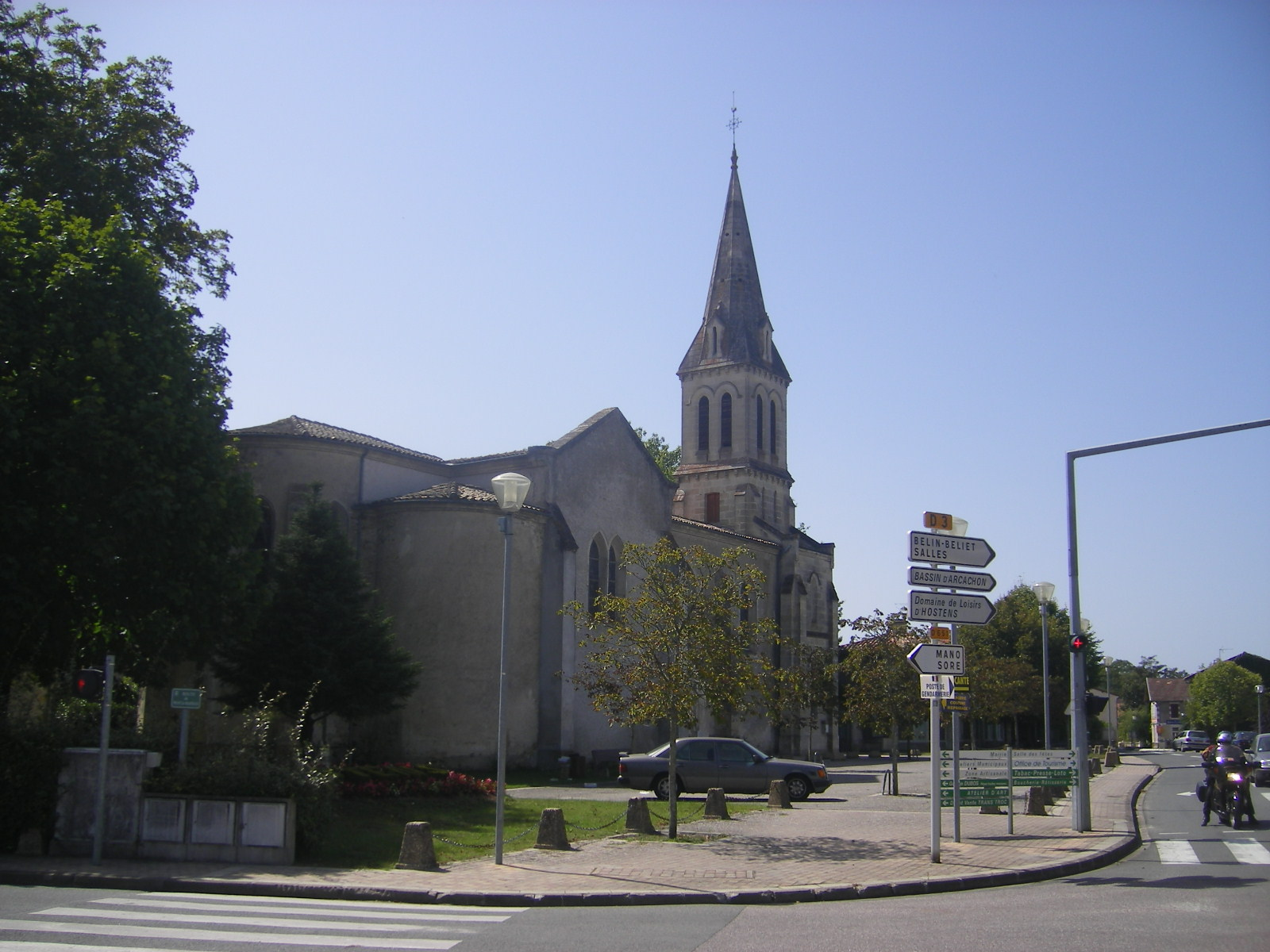 Hostens